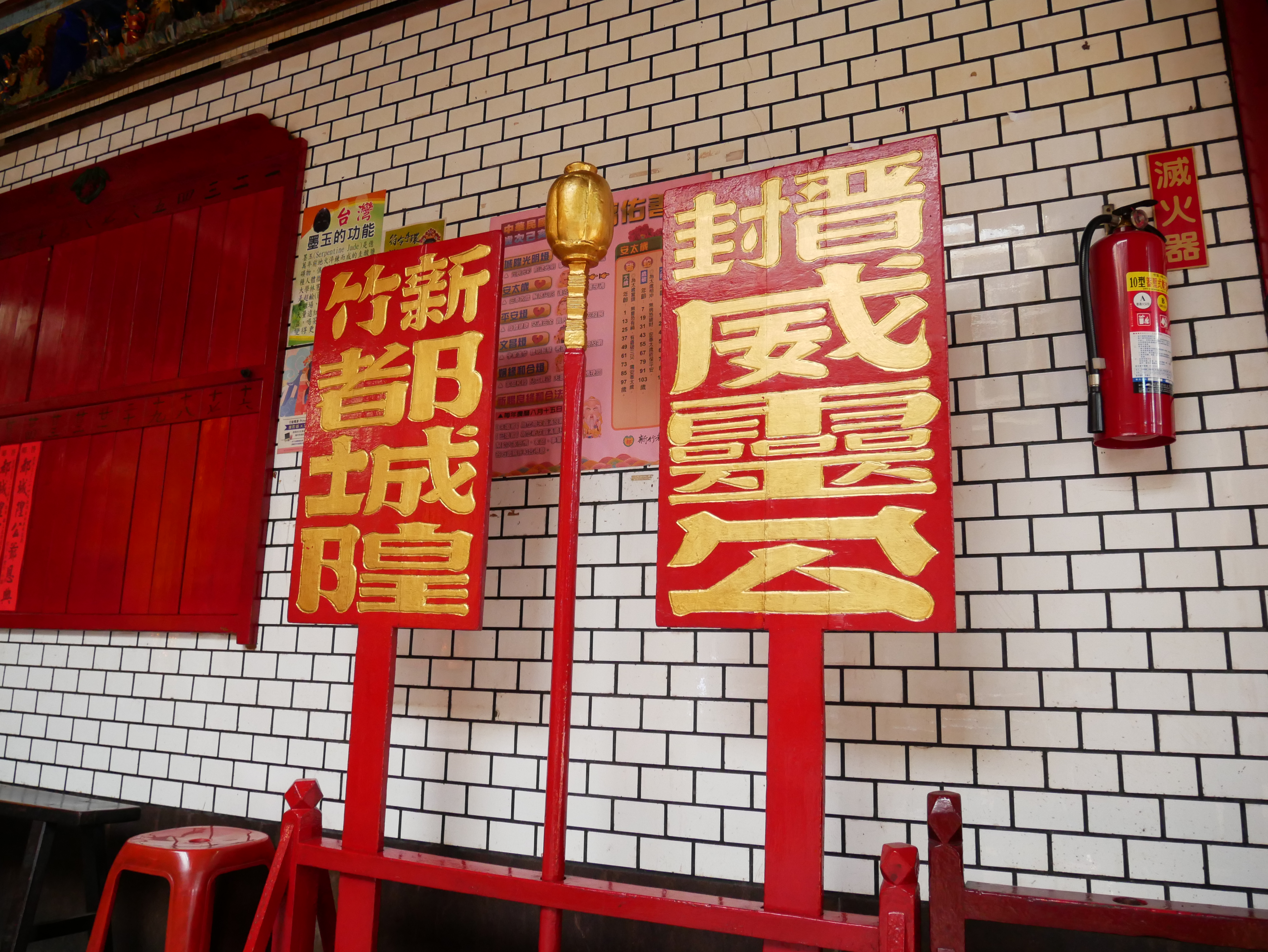 中文（台灣）: 新竹都城隍廟執事牌，新竹市北區北門聯里中山里